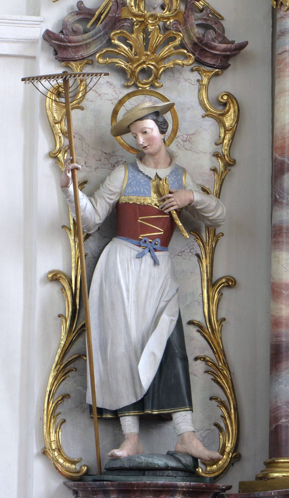 Hl. Notburga in der Kirche Heiligkreuz (Kempten) von Johann Sigmund Hitzelberger